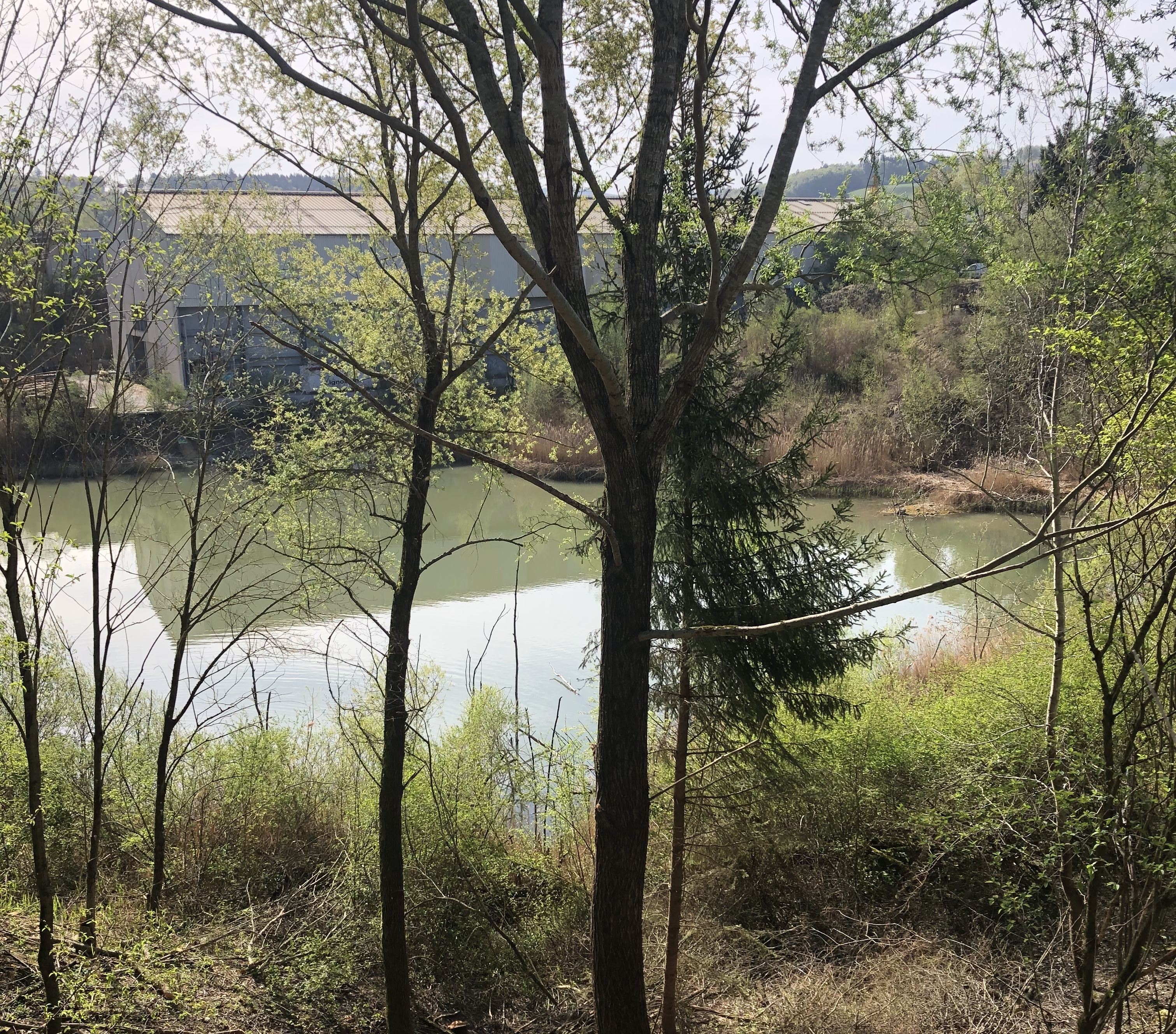 Kiesgrube Rehhag